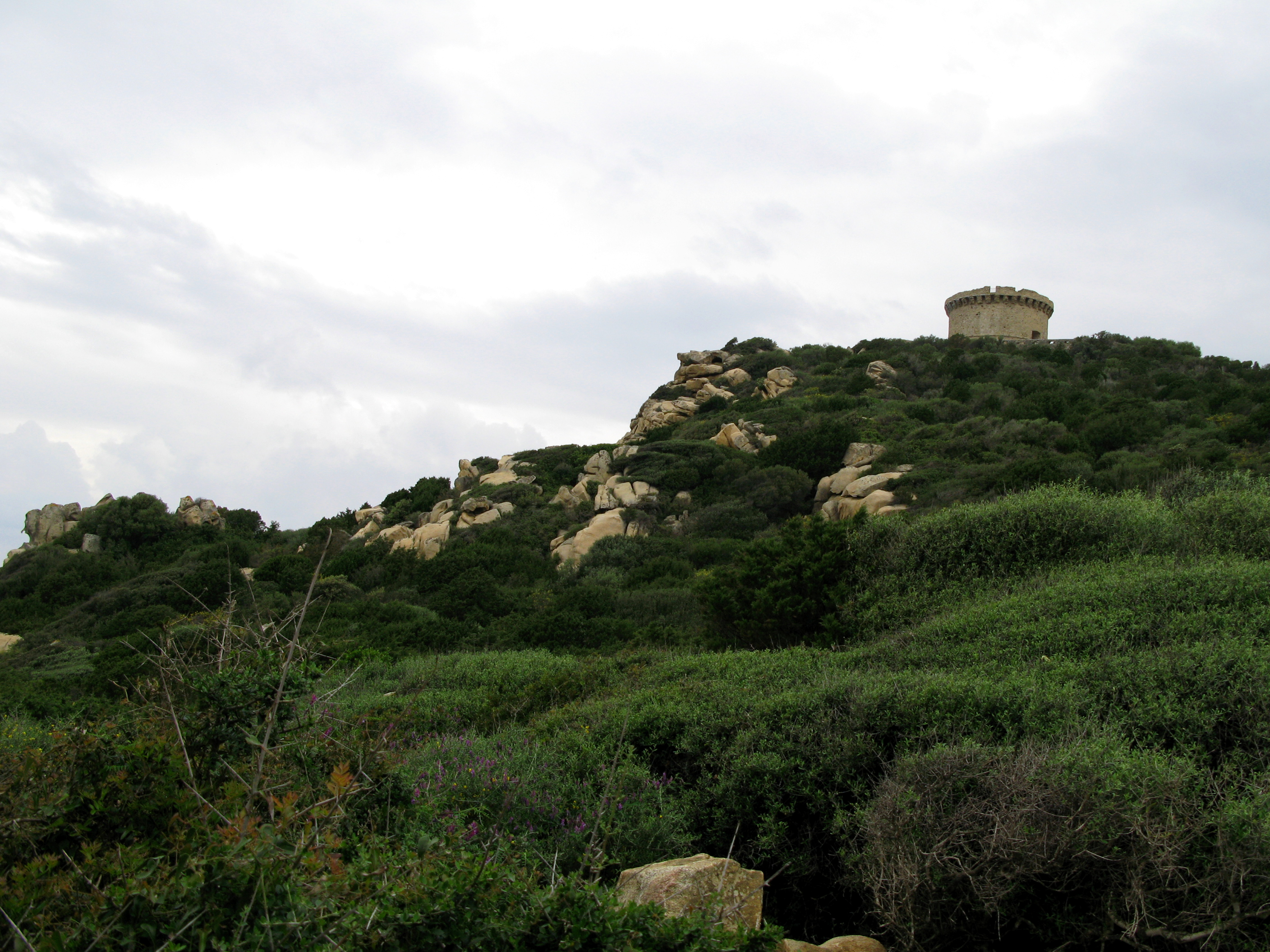 Belvédère-Campomoro (Corse-du-Sud, France) - La tour génoise. Aperçue pour la première fois à travers la végétation en montant le sentier qui y mène.